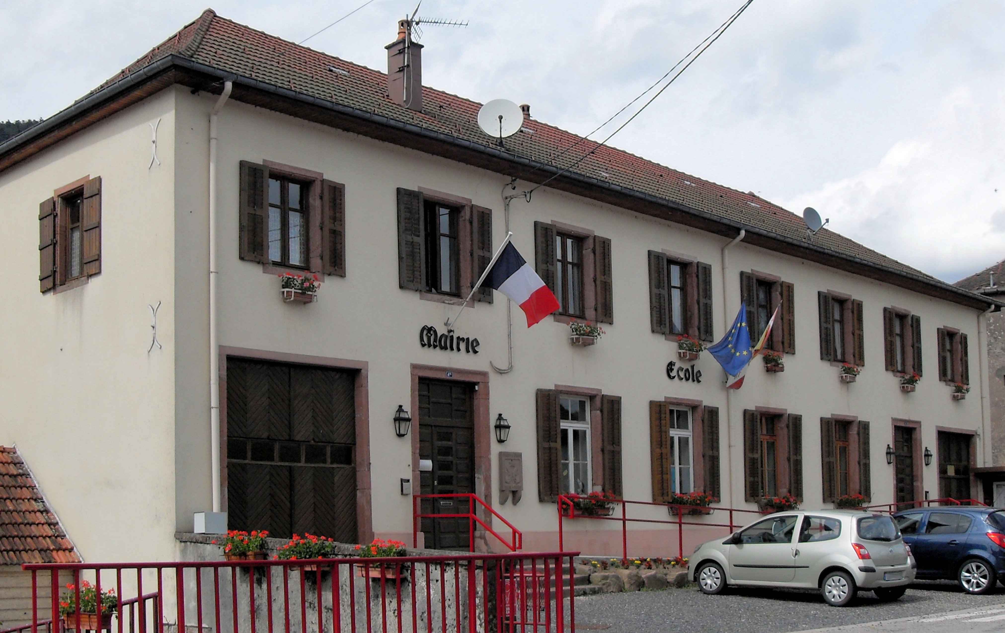 La mairie-école de Raon-sur-Plaine